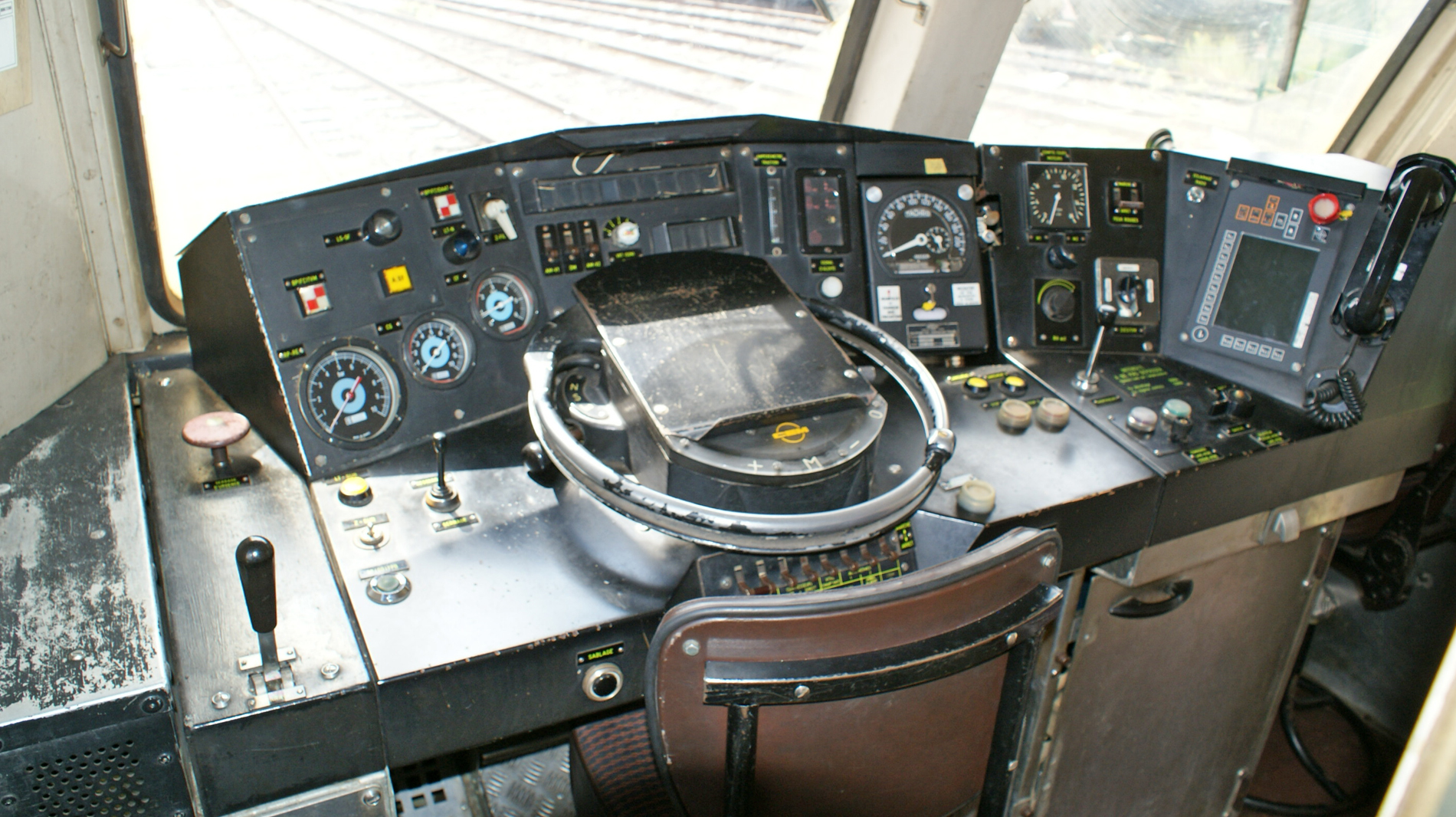 Pupitre BB 67200